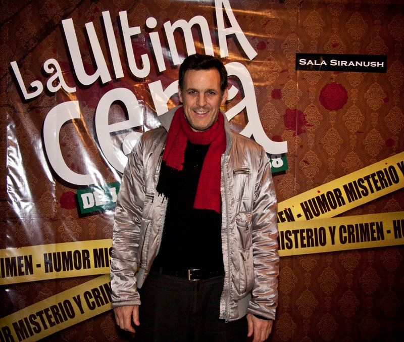 Nacho Gadano se se presenta a ver una función en La Ultima Cena de Egresados 88 En Sala Siranush